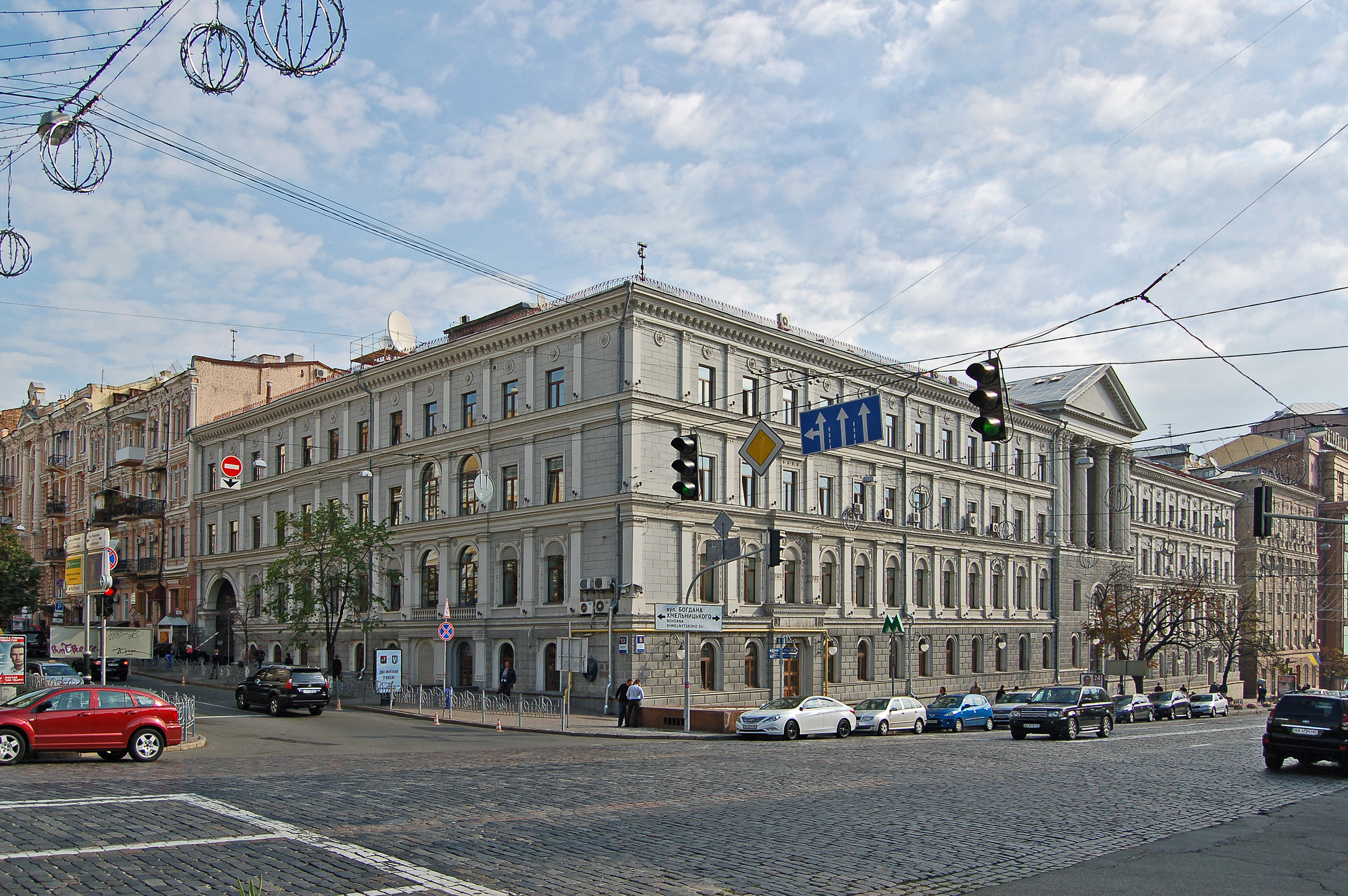 Дом № 6/13 по улице Богдана Хмельницкого в Киеве